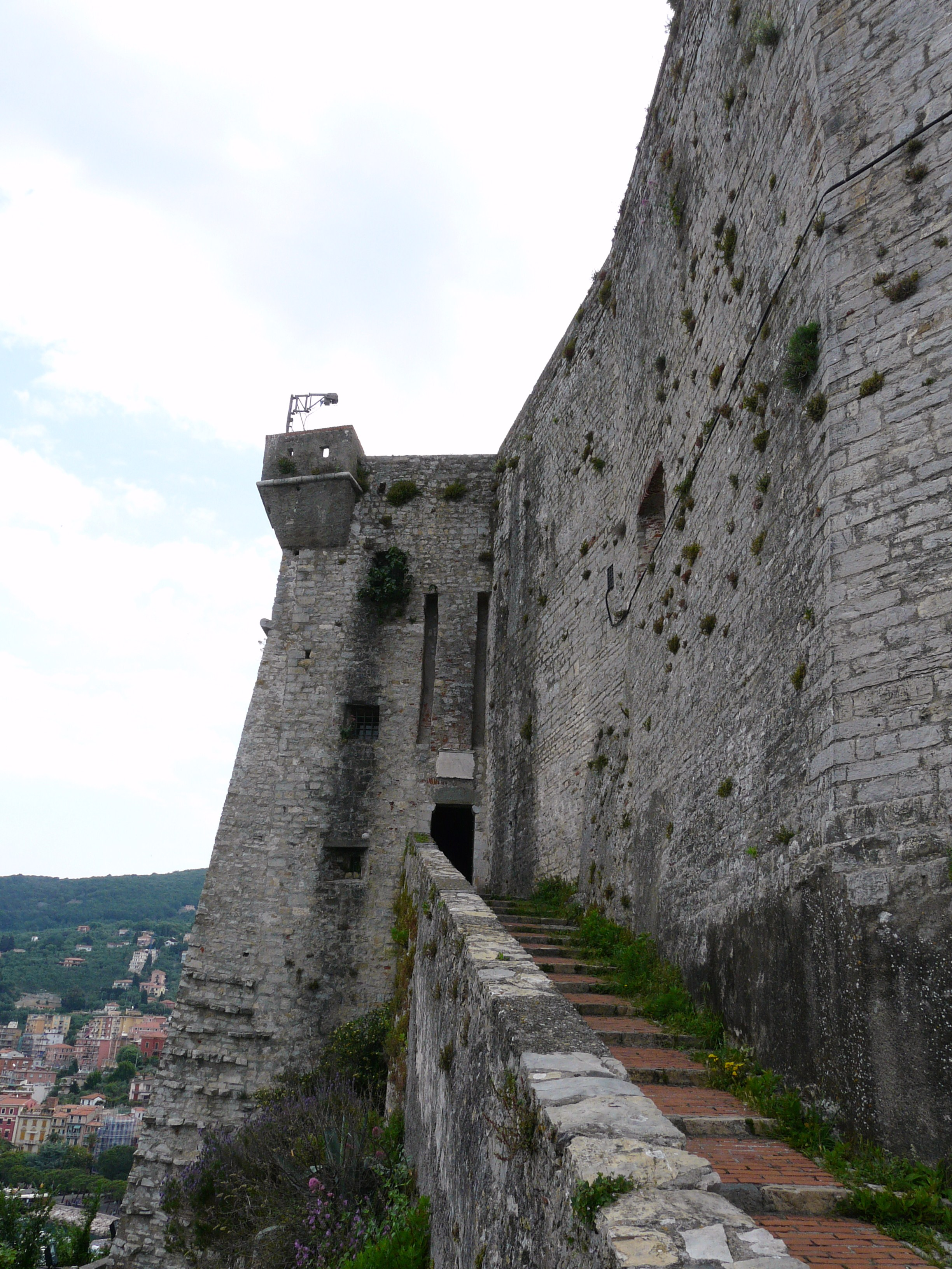 Il castello di Lerici, Liguria, Italia